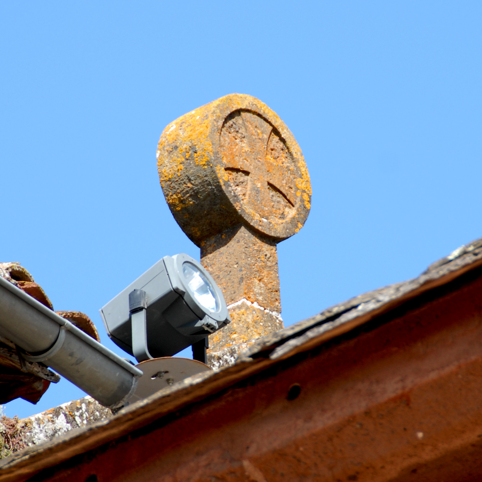 Abtei Saint-André Lavaudieu, Tatzenkreutz, Westgiebel